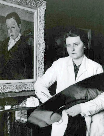 Vilma Vrbová-Kotrbová(1905-1993), česká malířka